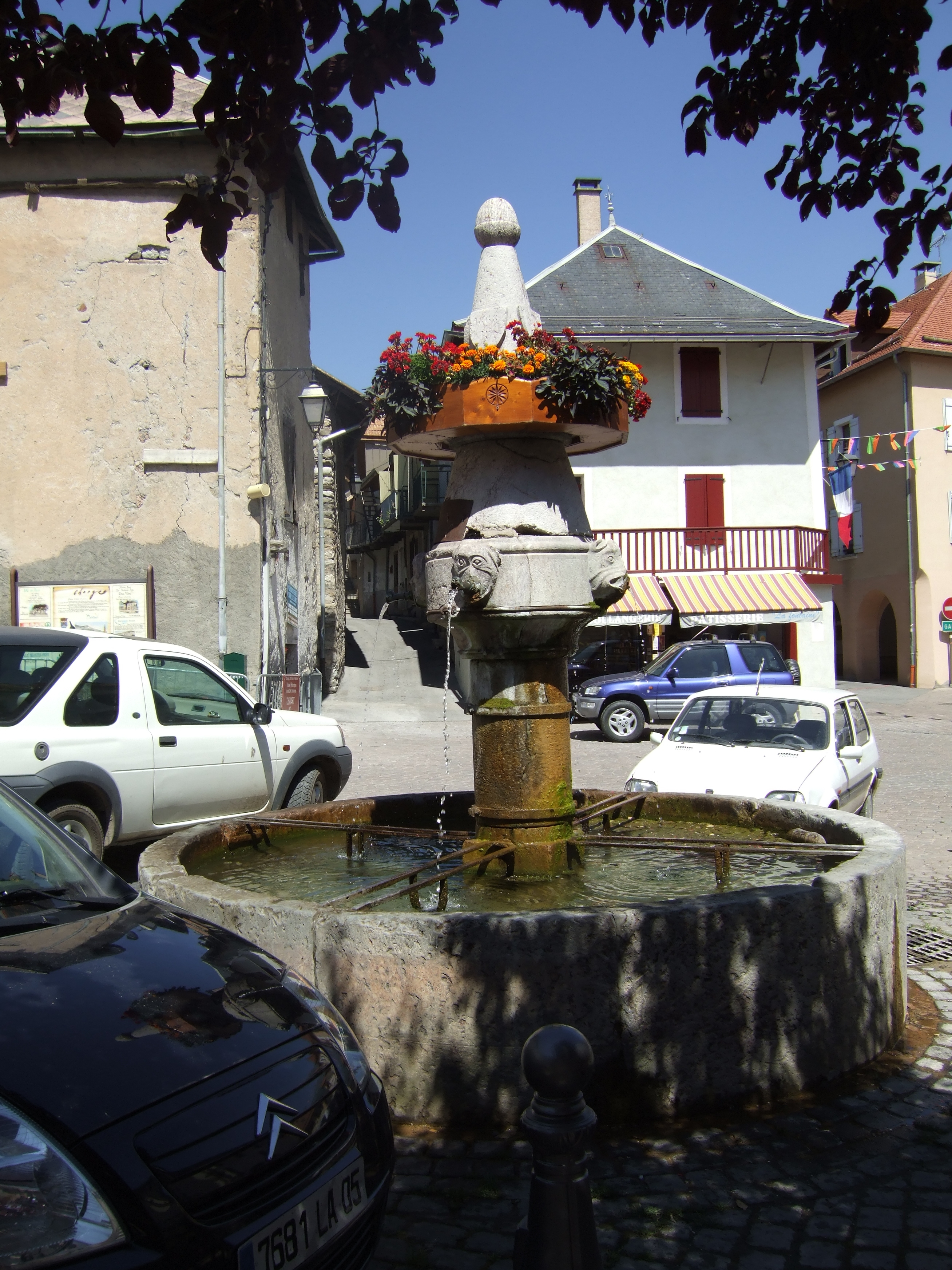 Fountain in Lesdiguières Square at Chorges (France)